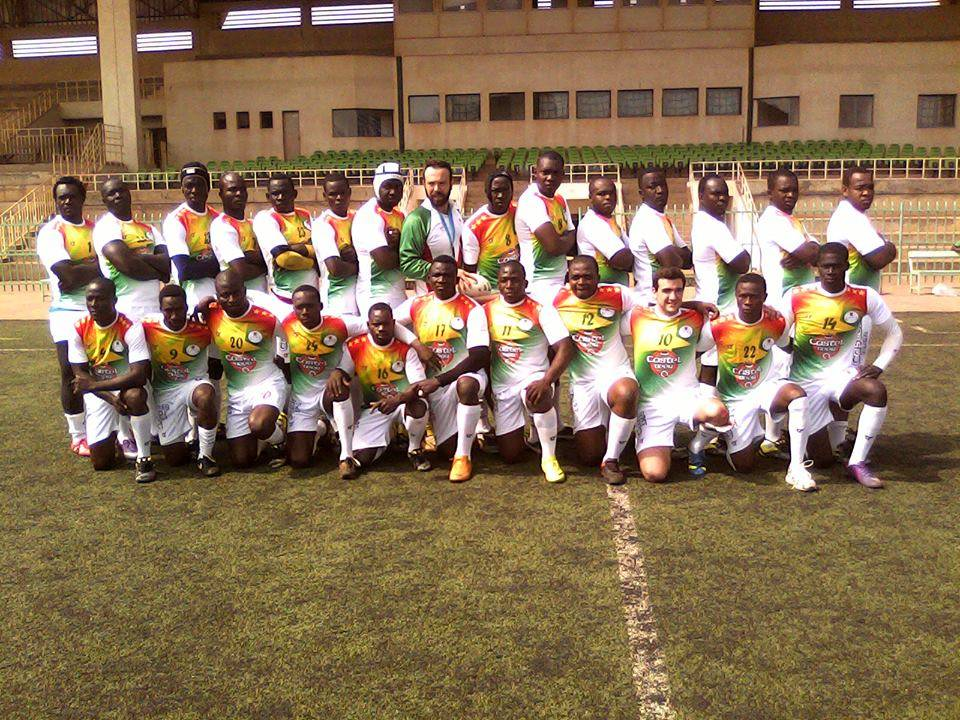 L'Equipe de rugby à XV du Burkina Faso en 2014